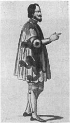 van , mijns inziens is de afbeelding publiek domein, aangezien er geen melding wordt gemaakt van eventuele licentie en het afgebeelde ouder dan 70 jaar is.